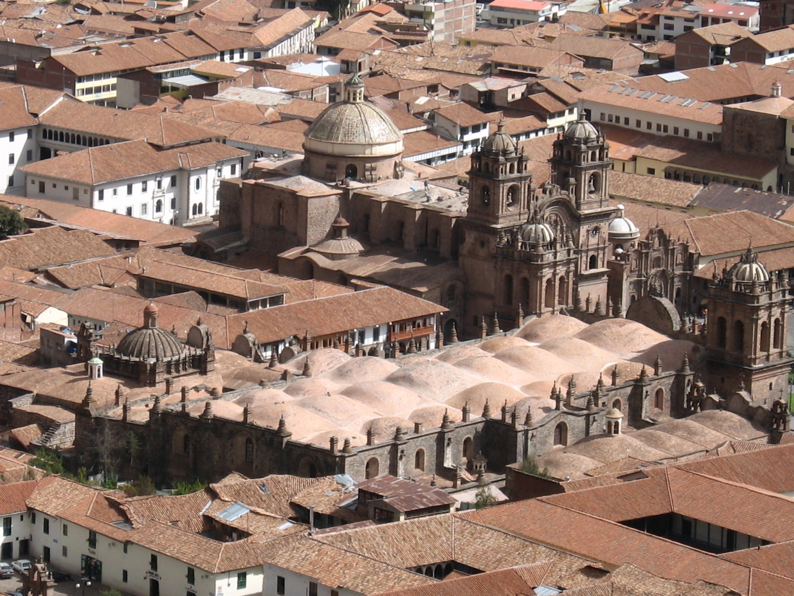 Cusco, Peru